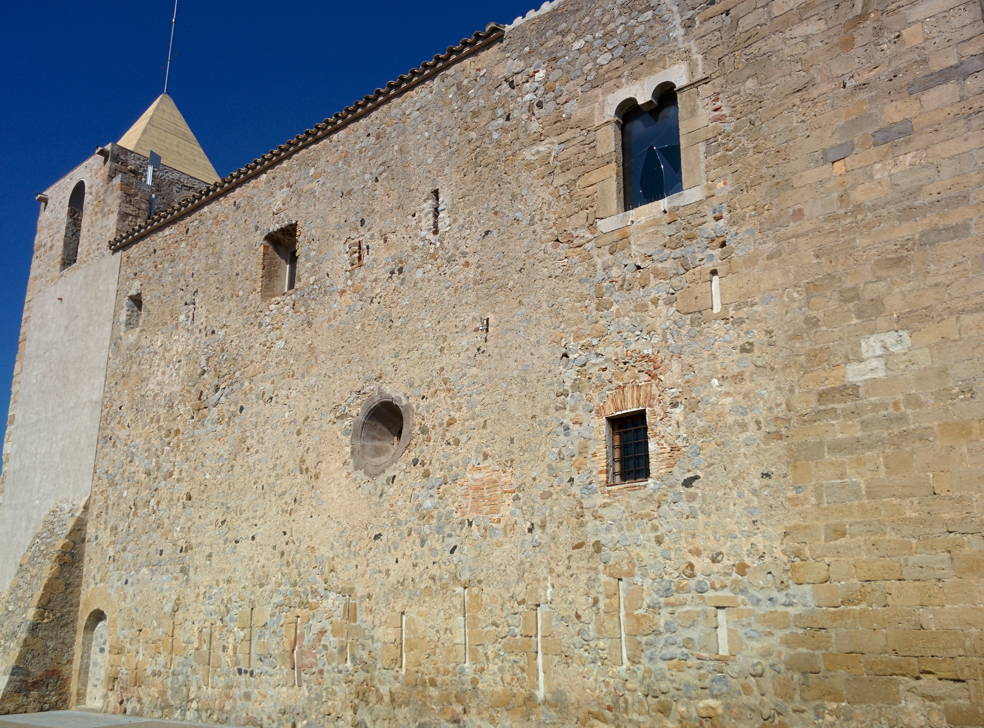 Castell de Calabuig (Bàscara)